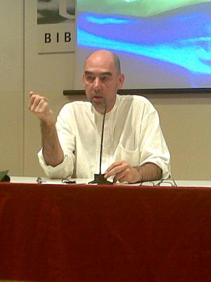 Xerrada-col·loqui organitzada per l'Associació de Terrassa per la Tercera República, sobre “Mercat i Ciutadania” a càrrec de Santiago Alba Rico